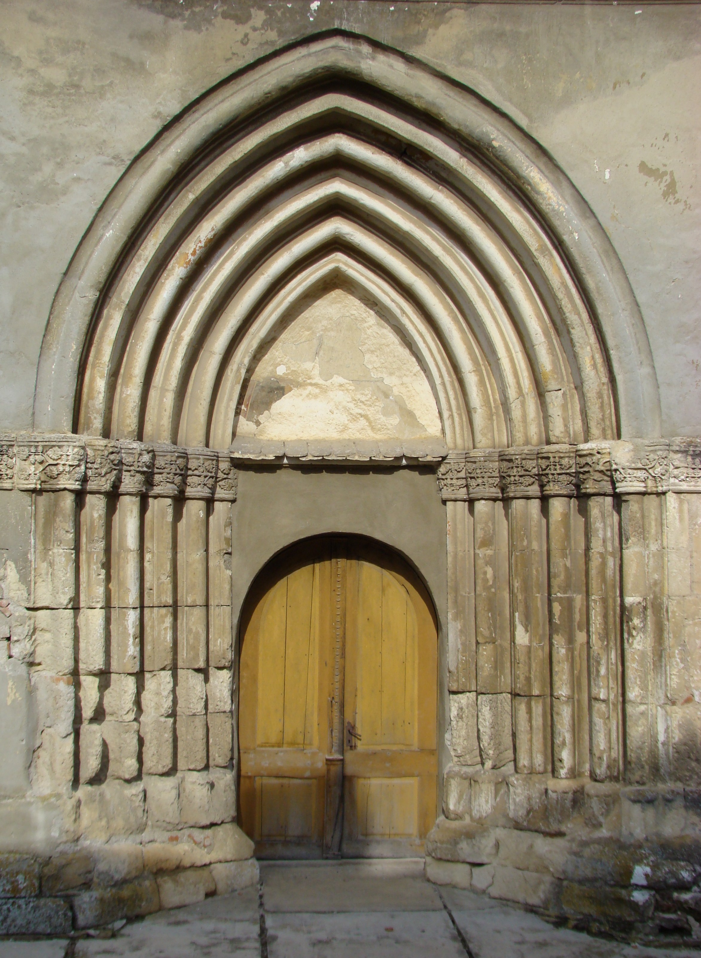 Biserica evanghelică, sat BĂGACIU, județul Mureș 01